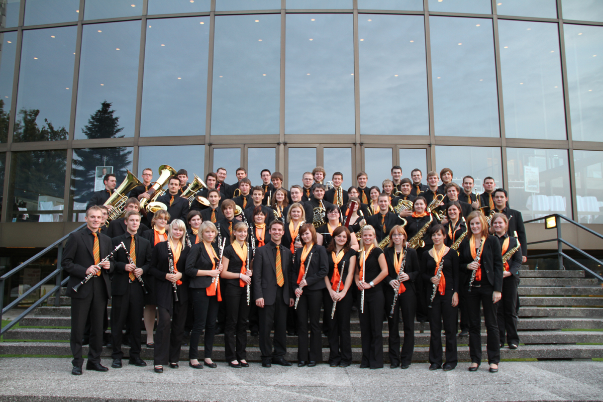 Gruppenfoto des Bezirksjugendorchesters Gmunden